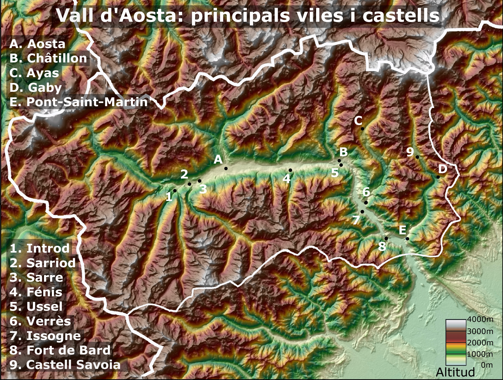 Principals viles i castells de la Val d'Aosta, Itàlia